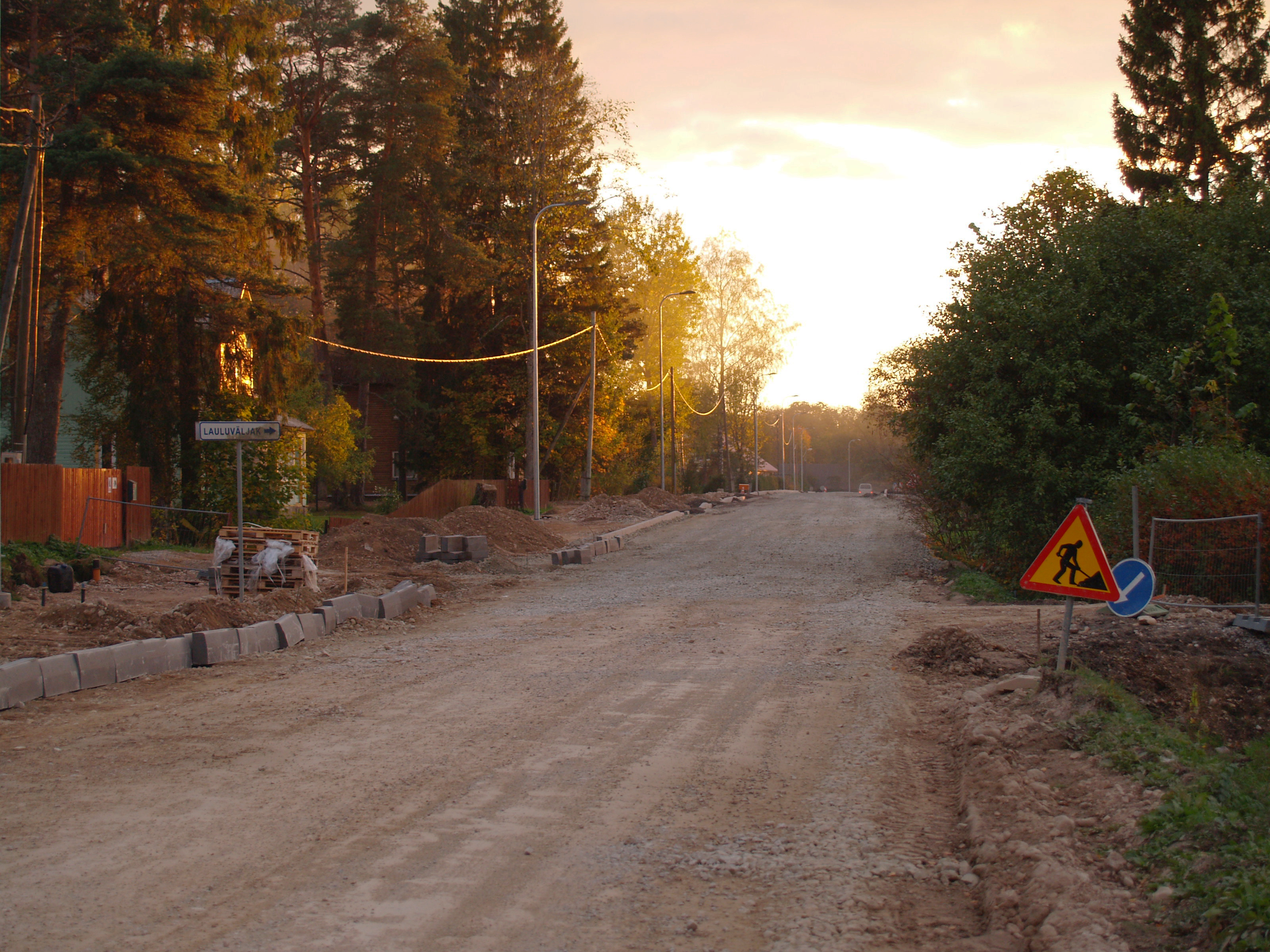 Uue veevärgi paigaldamine ja tee-ehitus Kosel 2010. aastal. Kose-Kehra maantee ja selle kõrval asuv kergliiklustee.